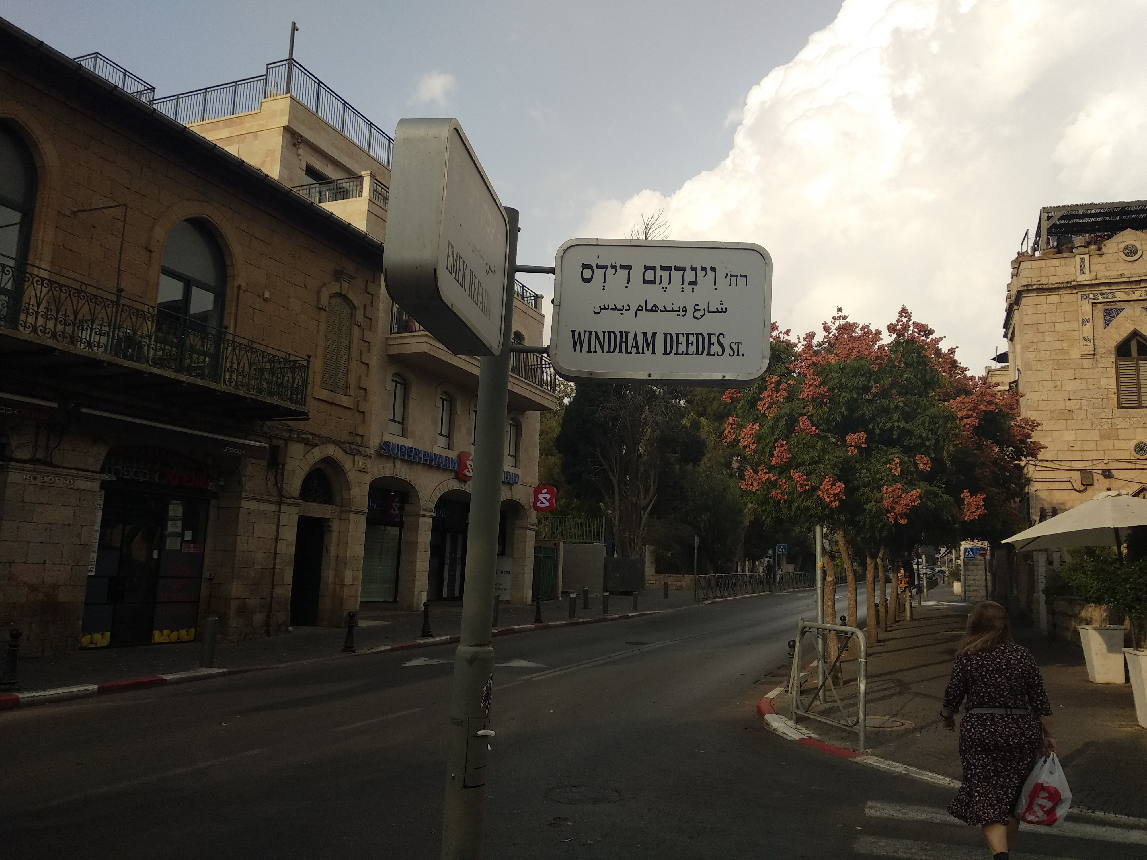 רחוב וינדהם דידס פינת רחוב עמק רפאים, ירושלים